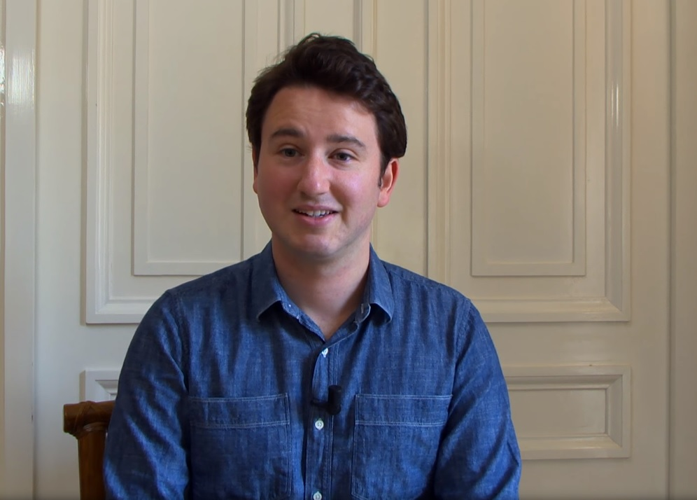 Gabriel Zucman vous présente son ouvrage "La richesse cachée des nations, enquête sur les paradis fiscaux" aux éditions du Seuil.